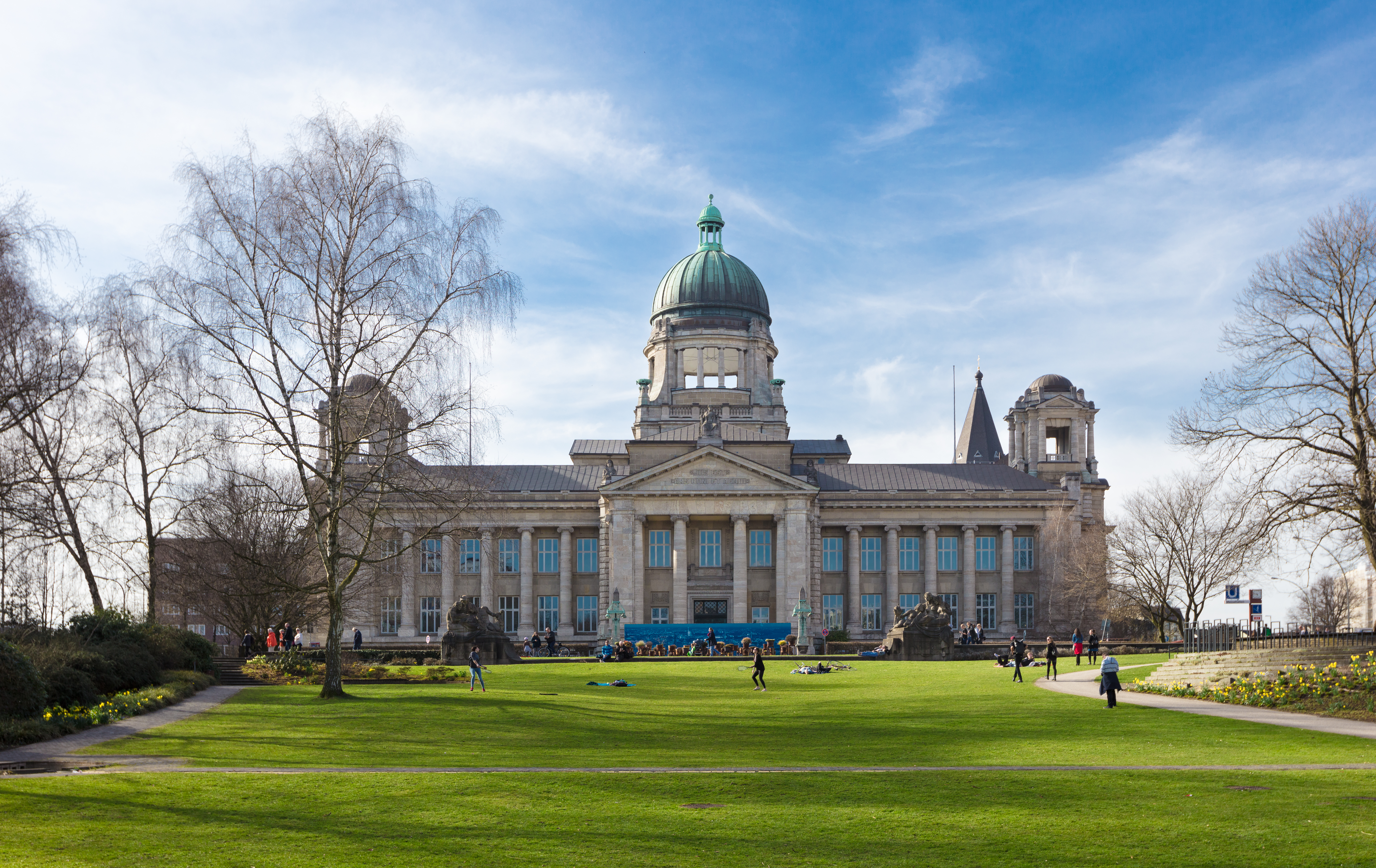 Hanseatisches Oberlandesgericht, Südostseite.